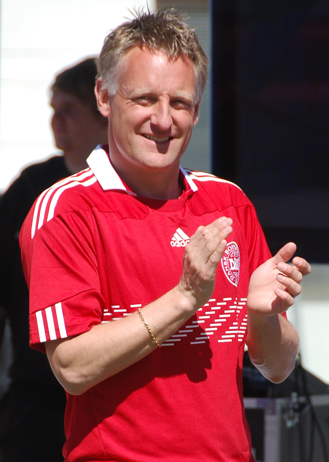 Fodboldspilleren Søren Frederiksen. Her i forbindelse med et arrangement for U-21 Europamesterskabet i fodbold 2011, hvor han var én af 4 ambassadører.